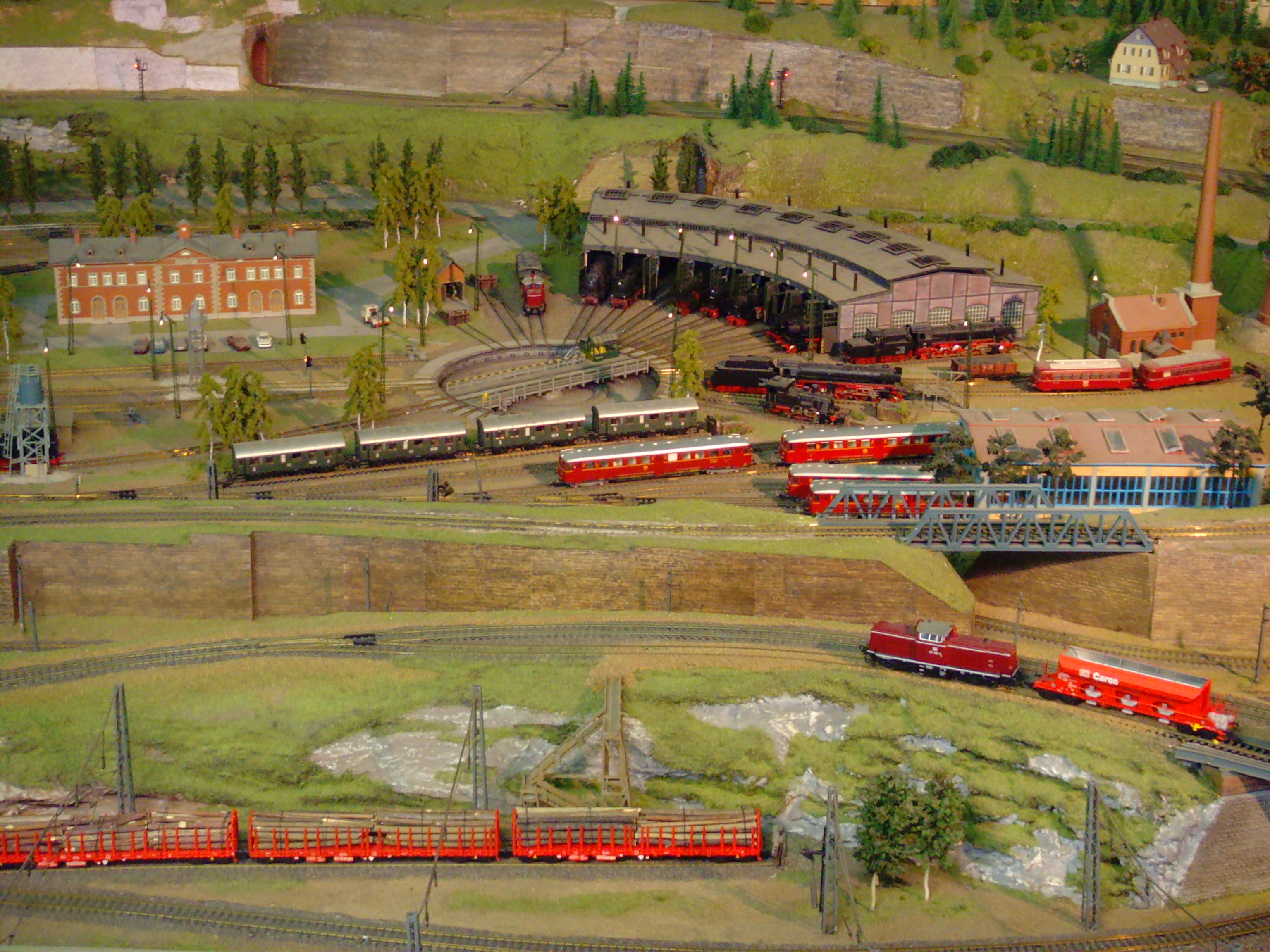 Verkehrsmuseum Karlsruhe 13 Modelleisenbahn